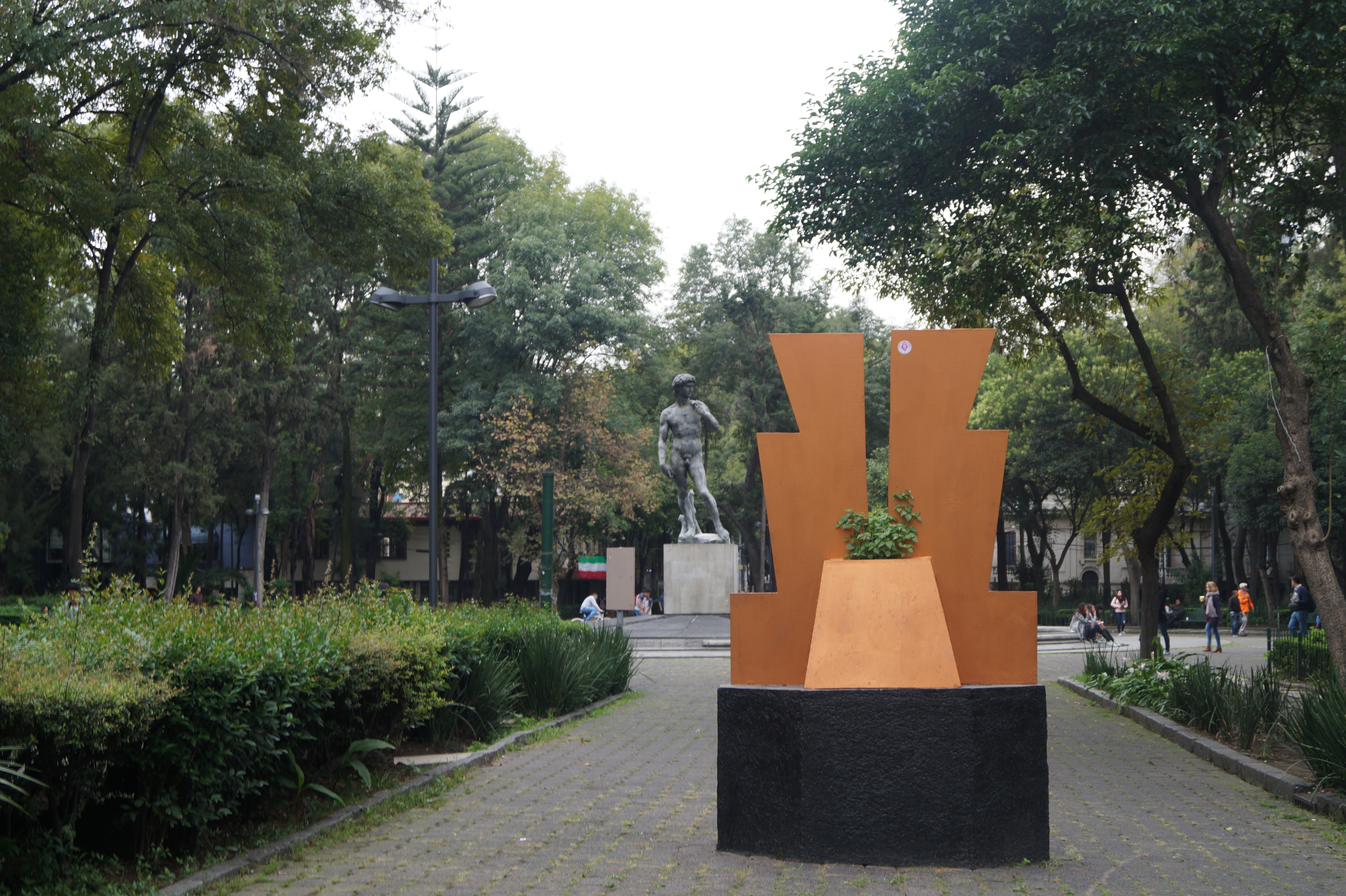 Vista de la calle Orizaba de la Plaza Río de Janeiro de la colonia Roma, delegación Cuauhtémoc, Ciudad de México.